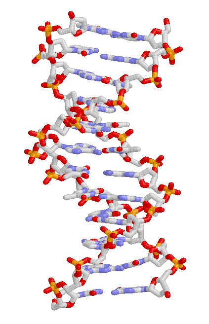 DNA structure